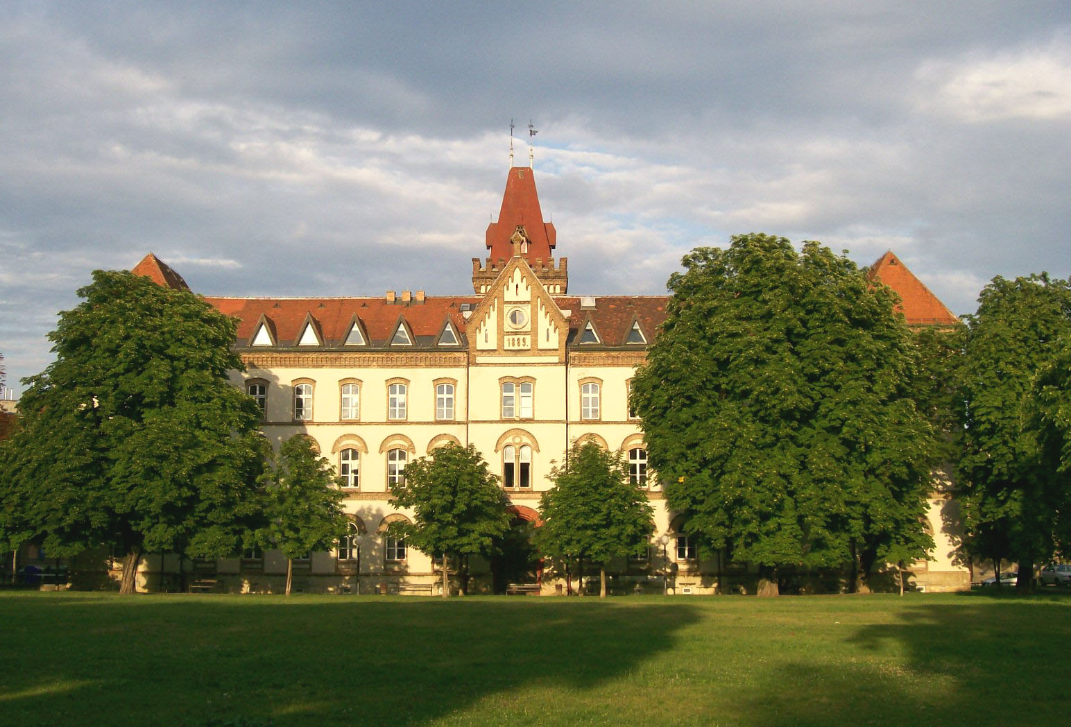 Zgrada iz kompleksa nekadašnje Rudofove vojarne u Ulici Republike Austrije, Zagreb